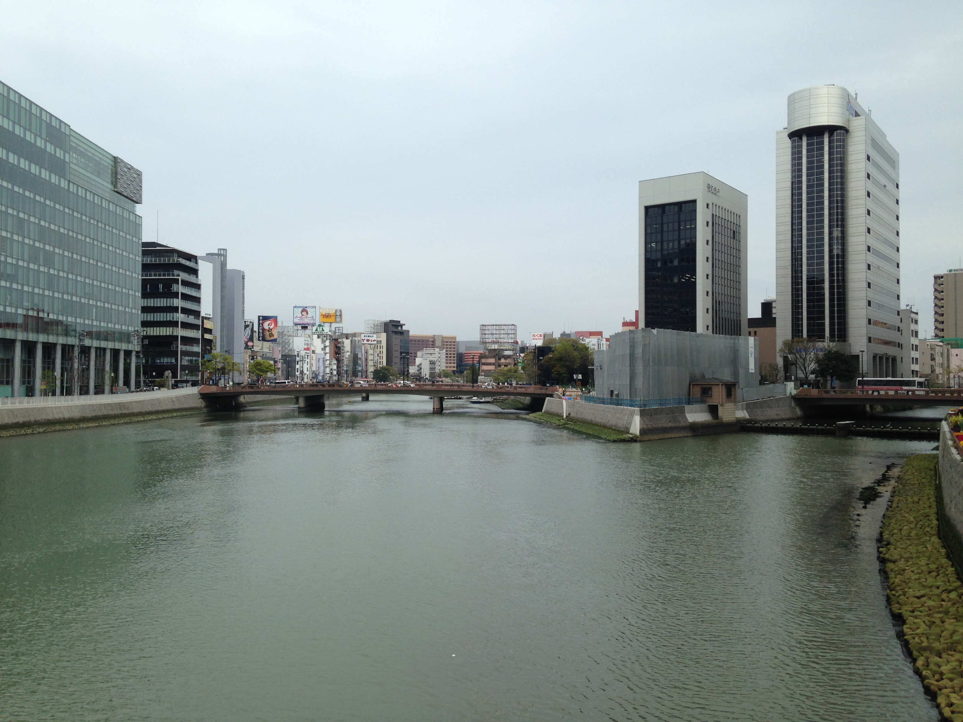 西中島橋より那珂川・西大橋方面を望む